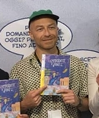 Presentazione al Napoli Comicon 2018 degli albi del progetto Fumetti nei Musei (di MiBACT e Coconino Press) ambientati in Campania, con autori e rappresentanti delle istituzioni museali coinvolte. Da sinistra il direttore del parco archeologico di Paestum Grabriel Zuchtriegel, Dottor Pira, la vicedirettrice del Museo archeologico nazionale di Napoli, ZUZU, Maicol & Mirco e il direttore della Reggia di Caserta Mauro Felicori.